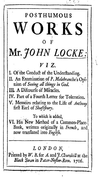 Portada del libro Trabajos póstumos de John Locke